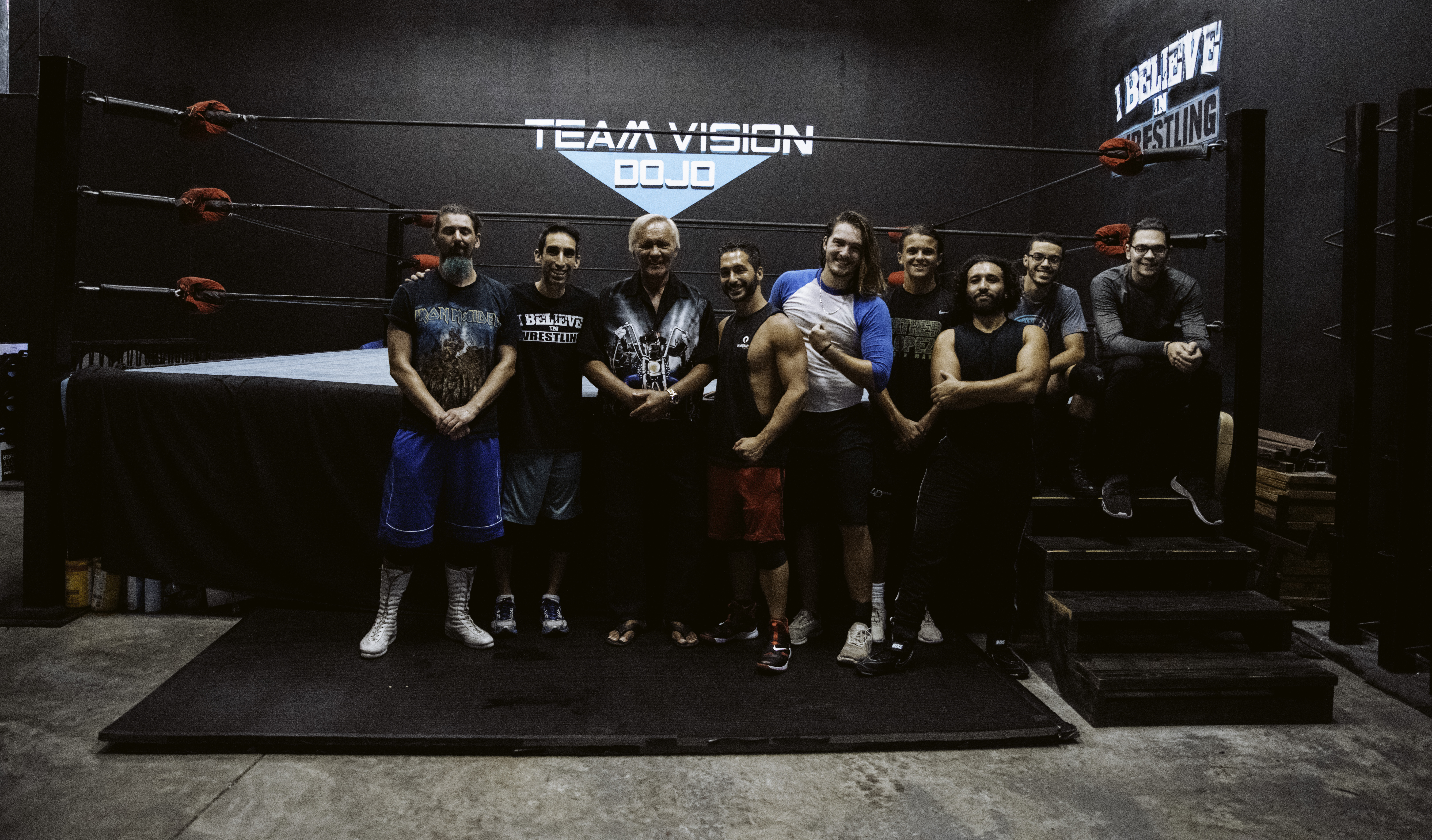 Larry Zbyszko (troisième en partant de la gauche) entourré des élèves de son école de catch à Orlando.